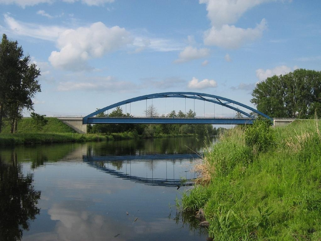 Der Havelkanal kurz vor seiner Mündung im die Havel bei Paretz (Brandenburg). Im Bild: die neuerbeute Brücke der Straße von Uetz nach Paretz.